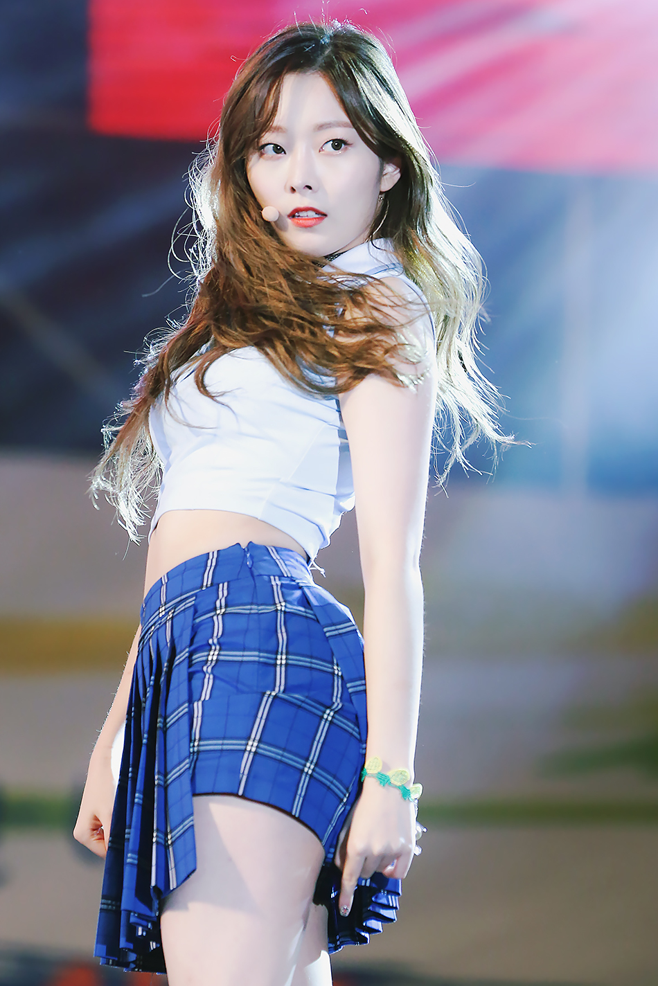 170917 안산시민축제